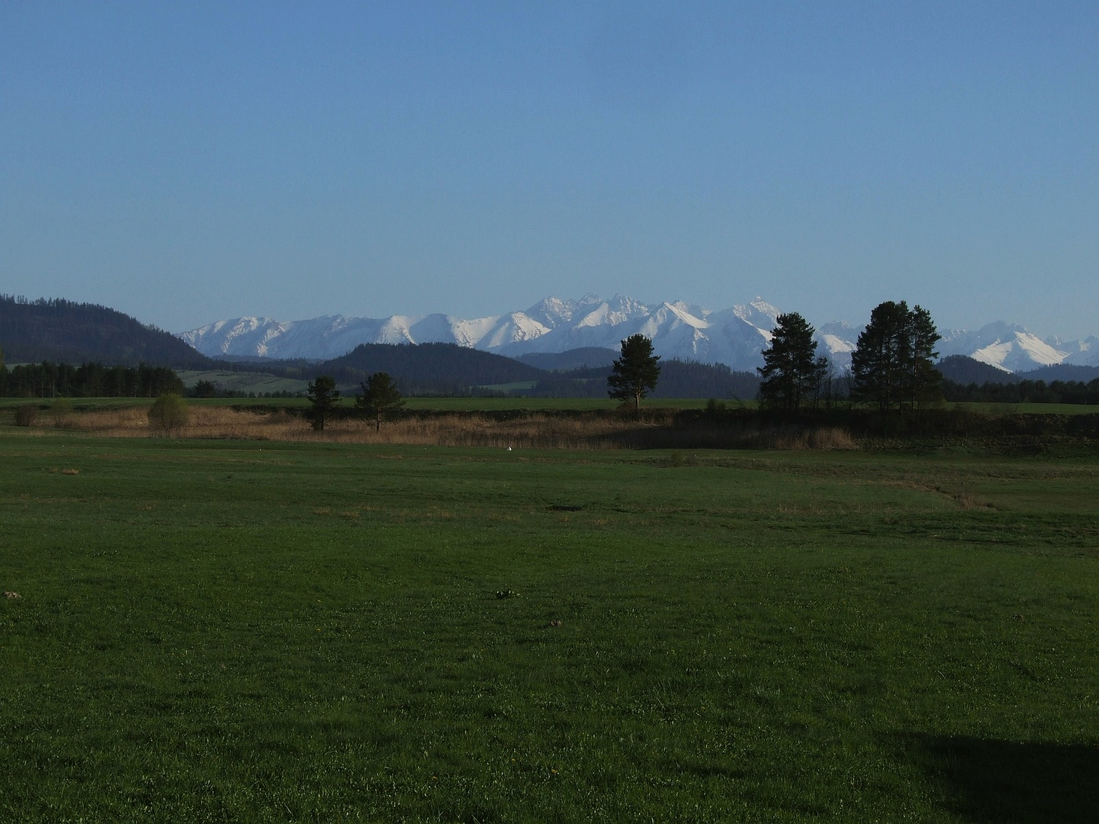 Polski Spisz w okolicach Nowej Białej i widok na Tatry i Pieniny Spiskie